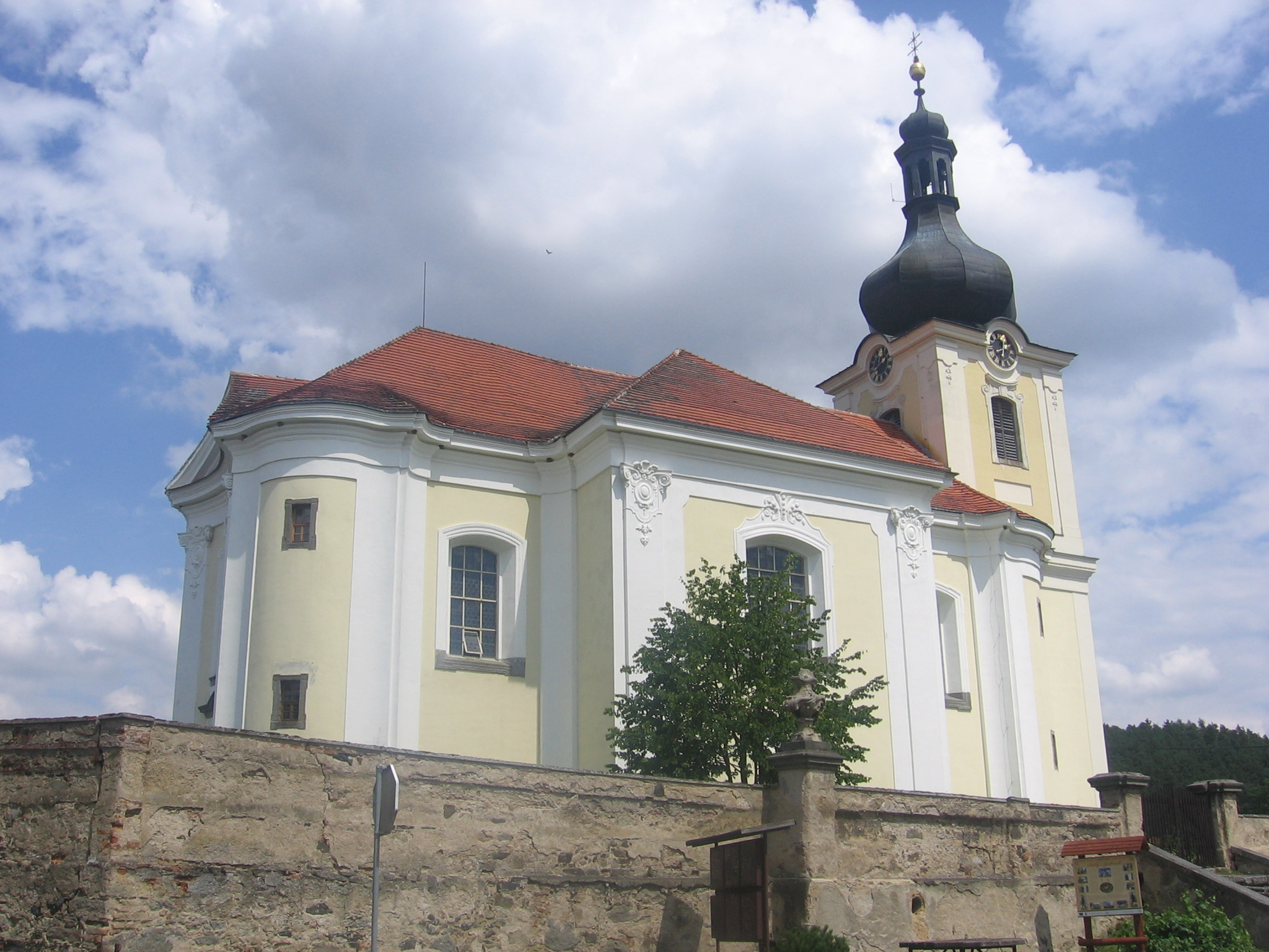 Kostel svatého Václava, náměstí, Žinkovy.